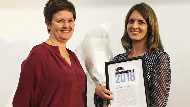 NTNU Litteraturpris 2018 tildeles en nålevende faglitterær forfatter som er knyttet til Trøndelag og som har utgitt sakprosa/faglitteratur i 2016-2017. Maria Berg Reinertsen ble tildelt prisen for fagboken Reisen til Bretton Woods.